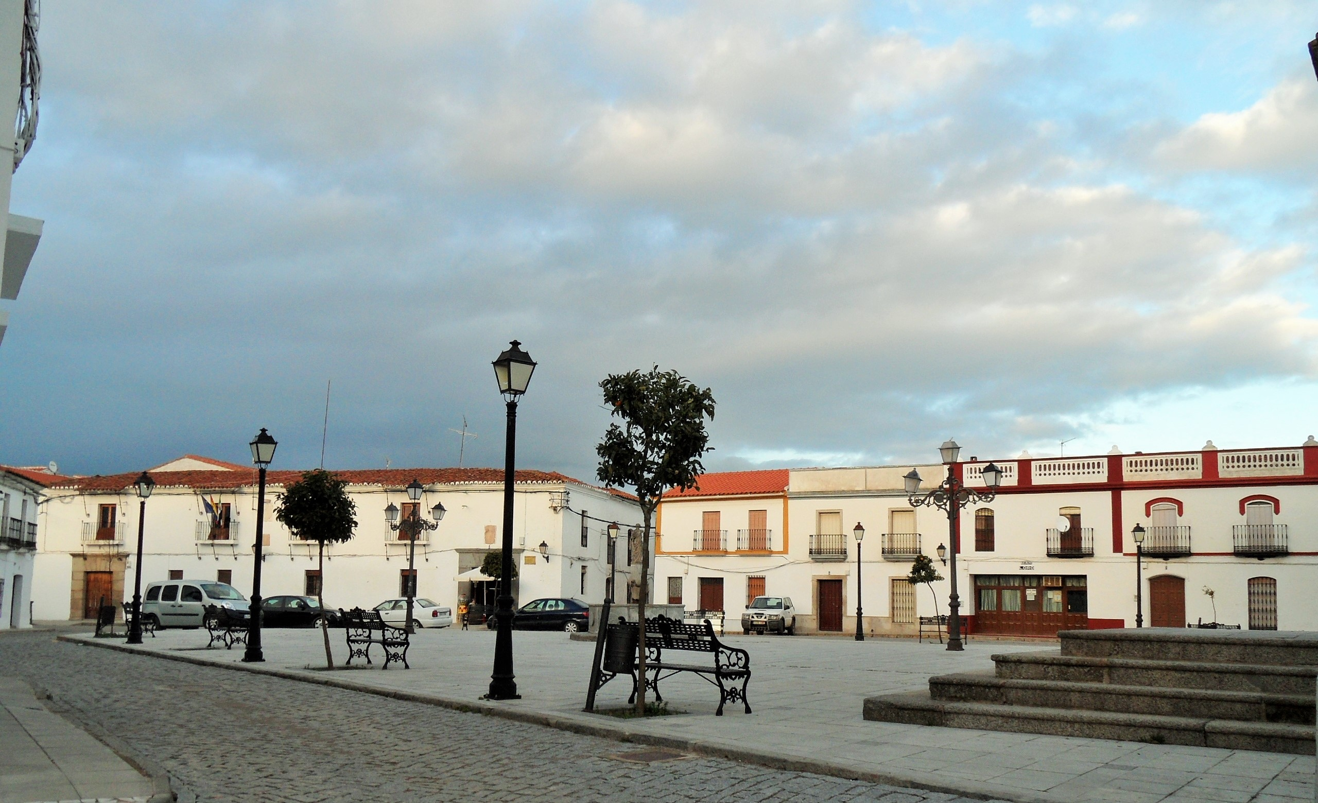 Plaza de España de Bodonal de la Sierra